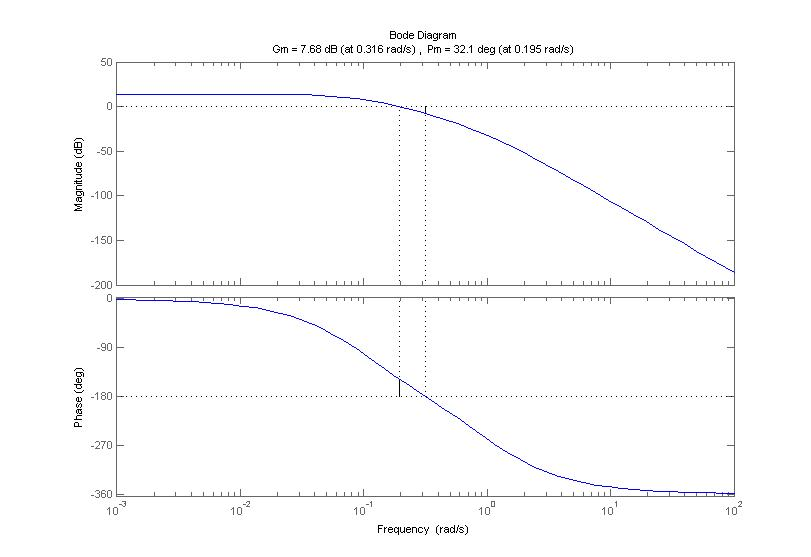 Vahvistus ja vaihevaran selvittäminen bode-diagrammin avulla.